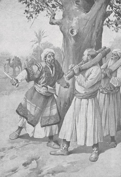 Ilustrace ke knize Karla Maye Karavana otroků (nakl. Toužimský & a Moravec, 1934)